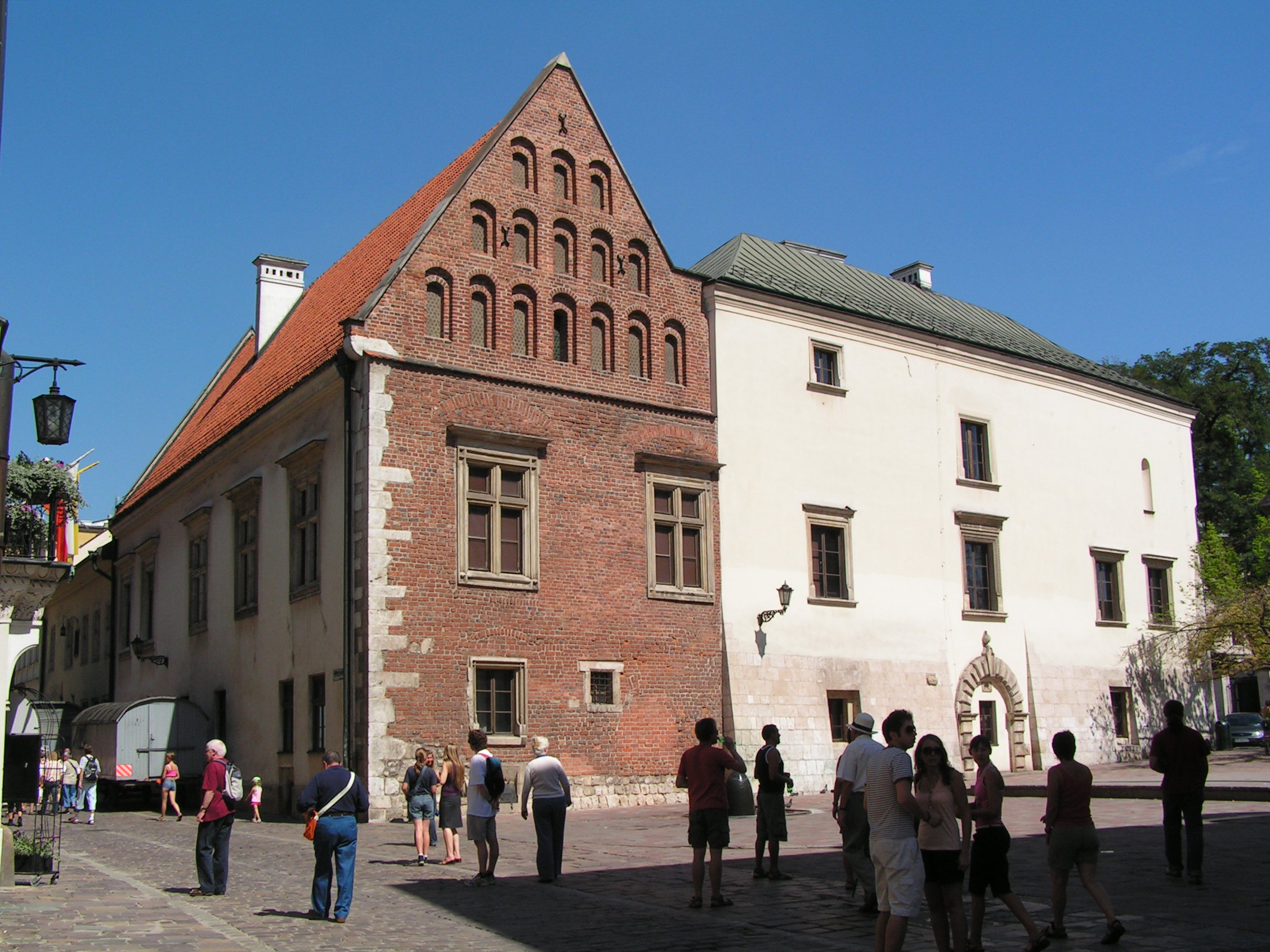 Collegium Iuridicum, Kraków